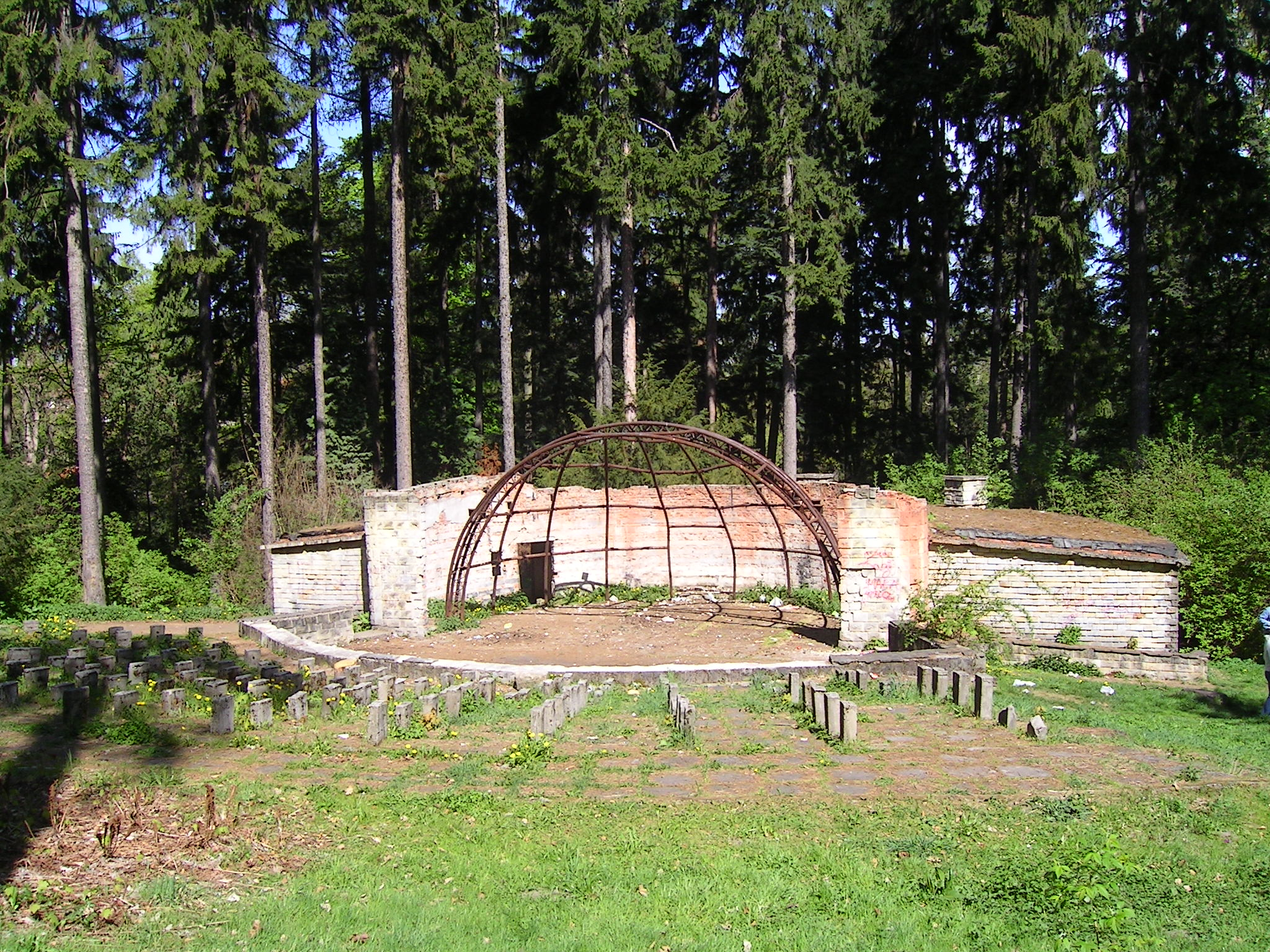 Amfiteatr w Szczawnie Zdroju